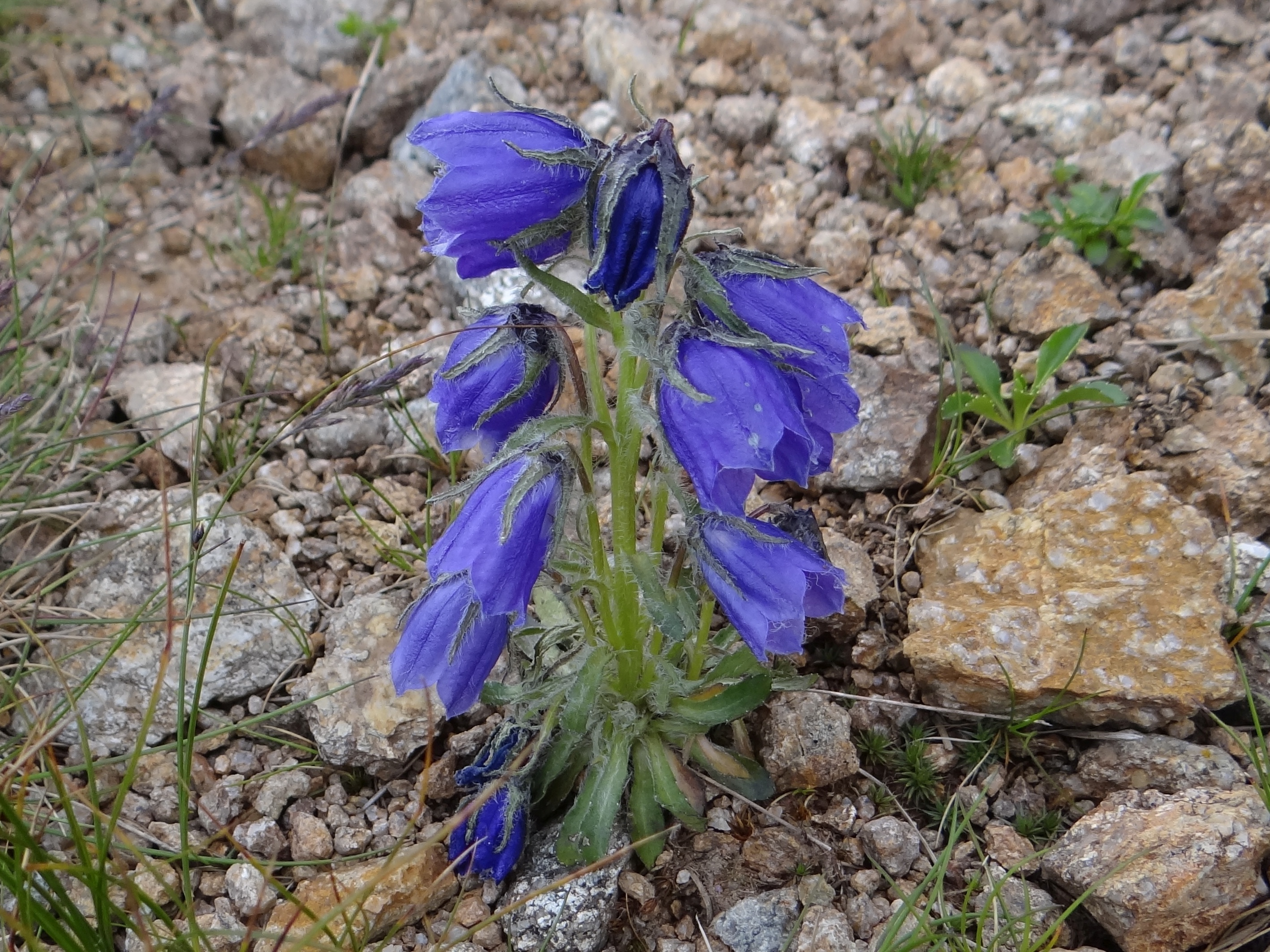 Campanula alpina (location: Slovakia, Tatry Niżne, Chopok)